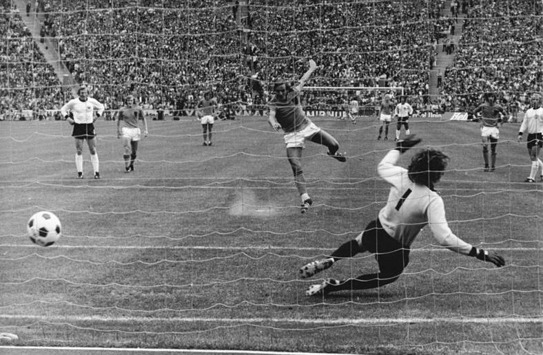 ADN-ZB-Mittelstädt-16.7.74-wen-München: X. Fußball-Weltmeisterschaft- Endspiel BRD gegen Niederlande 2:1 am 7.7.74- Johannes Cruyff (Niederlande) bringt mit diesem Elfmeterschuß seine Mannschaft 1:0 in Führung. BRD-Torwart Sepp Maier hat sich die verkehrte Ecke ausgesucht. Information added by Wikimedia users.Anmerkung: Der niederländische Elfmeterschütze ist nicht Cruyff, sondern Johan Neeskens.